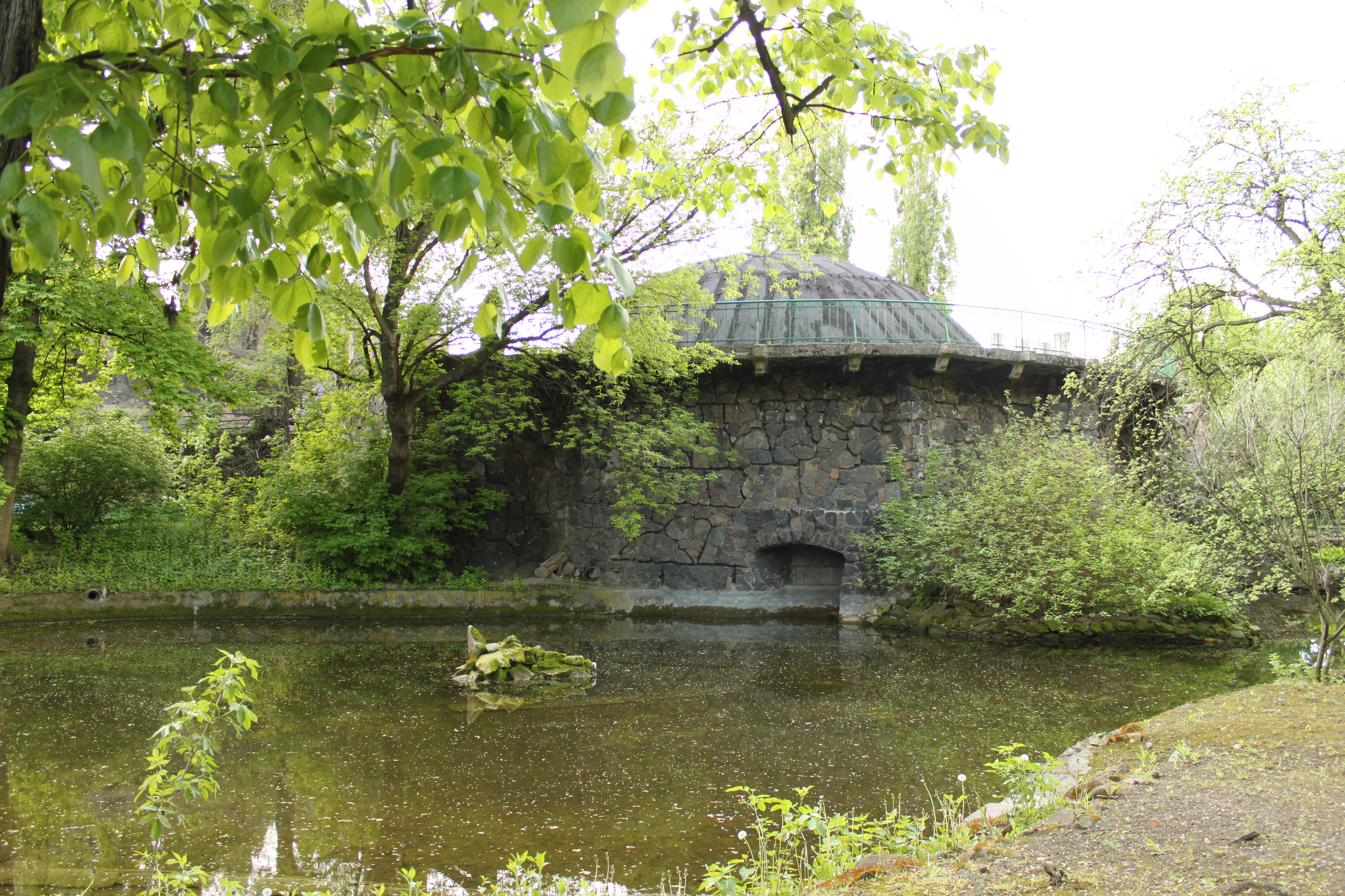 Stare Zoo